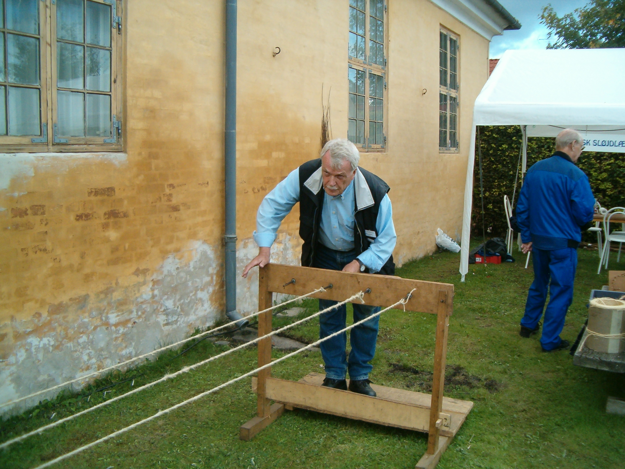 Dansk Sløjdlærerskoles mobile reberbane opstillet på Dansk Jagt- og Skovbrugsmuseum Hørsholm ved Værkstedsdage 2006 med Københavns Kommunes Sløjdlærerforenings gamle formand Erik Houlberg Hansen (f. 1931) ved håndsvinget.